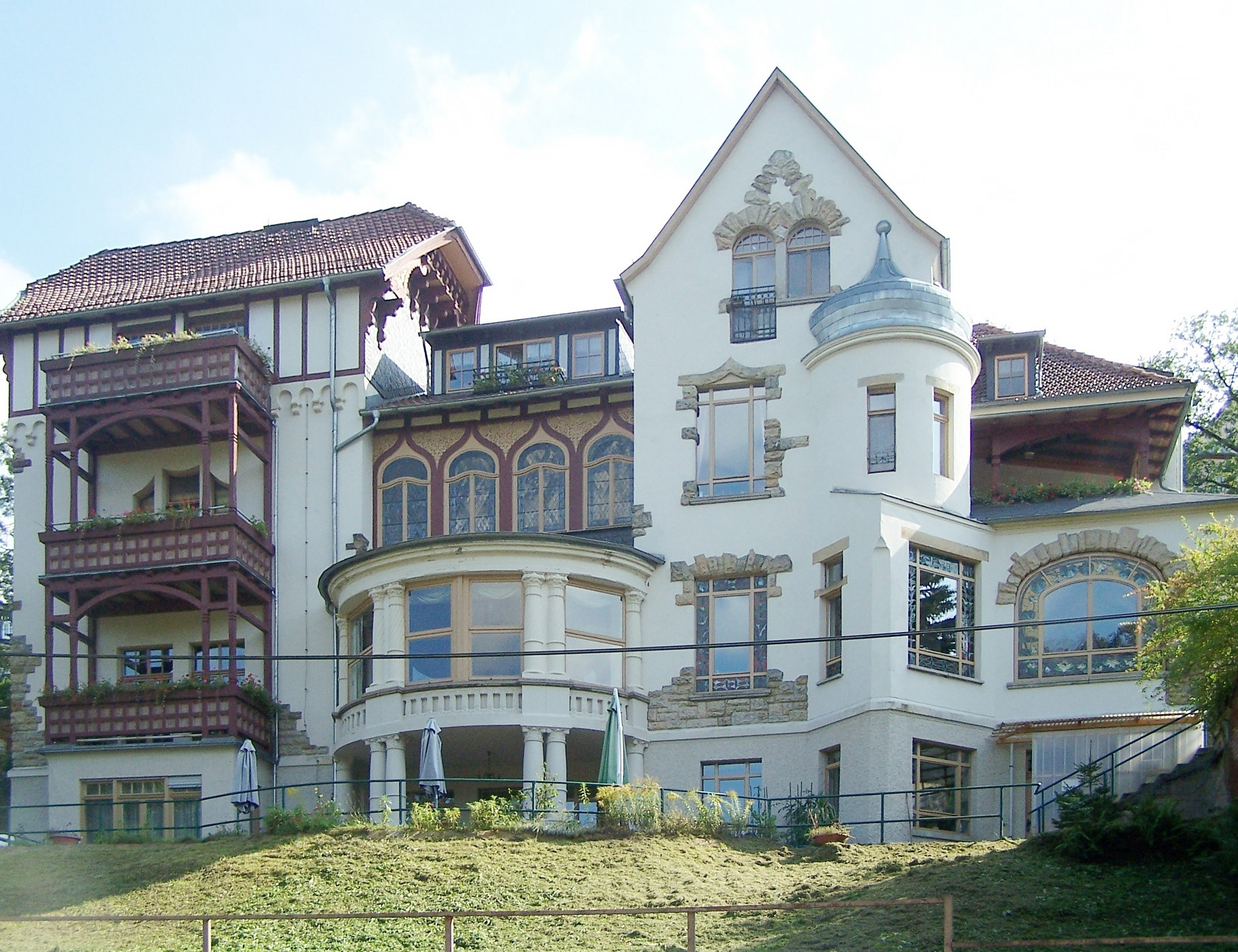 Die Villa GHaus Felseneck - heute ein Altersheim.